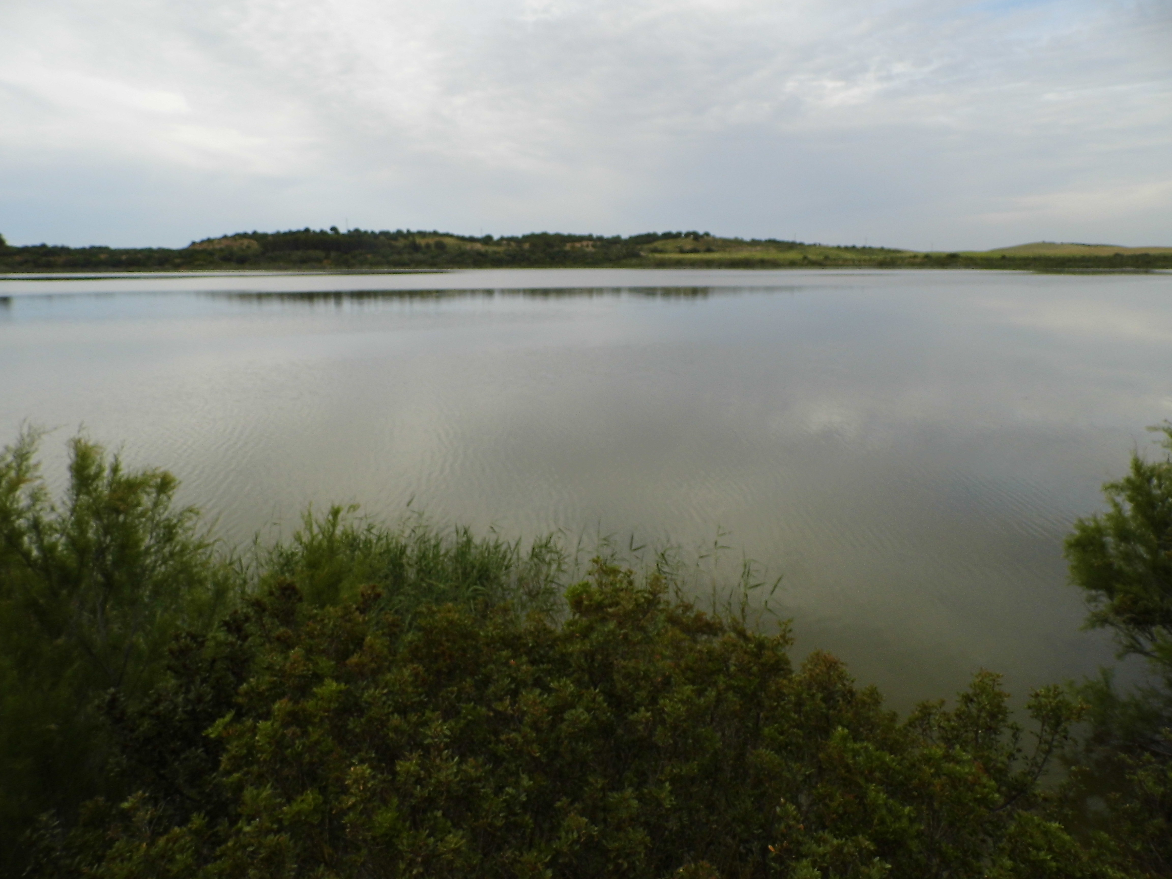 Laguna de Medina This is a photography of a Site of Community Importance in Spain with the ID: ES0000027. Natura2000 entry, EEA entry